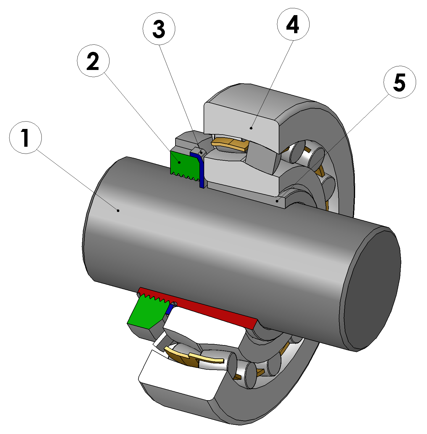 de: Befestigung eines Wälzlagers mit kegligem Innendurchmesser auf einer zylindrischen Achse/Welle mittels Spannhülse im 120°-Schnitt. Die einzelnen Bauteil sind mit Nummern versehen und haben folgende Bedeutung: 1)Achse/Welle 2)Nutmutter (DIN981), grün 3)Sicherungsblech (DIN5406), blau 4)Waelzlager (hier: Pendelrollenlager) 5)Spannhuelse (DIN5415), rot Das Sicherungsblech greift mit seiner am Innerdurchmesser befindlichen Nase in die Nut der Spannhuelse. Eine der am aeusseren Umfang befindlichen Laschen ist umgebogen und greift in eine Nut der Nutmutter ein. Dadurch wird ein Lösen der Mutter durch Formschluss sicher verhindert. Die Schnittflächen sind eingefärbt. Da die Spannhuelse oben geschlitzt ist (vgl. nicht geschnittene Spannhülse), ergibt sich für die Spannhülse nur im unteren Bereich nur eine Schnittflaeche (rot).